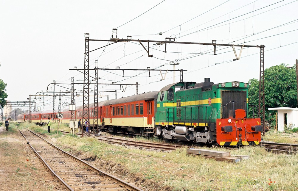 ONCF DI 504 à Fès